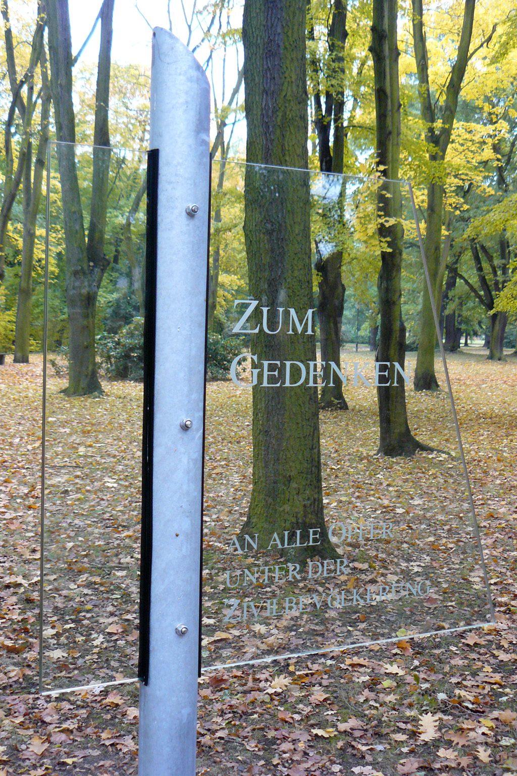 Eine der vier Wegtafeln der Denkmalanlage "Hürden überwinden" in Spremberg. Inschrift: ZUM GEDENKEN AN ALLE OPFER UNTER DER ZIVILBEVÖLKERUNG